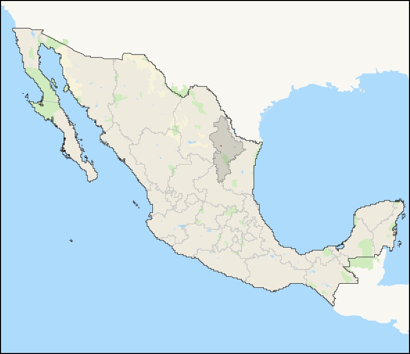 Mapa del distrito electoral federal 5 de Nuevo León ubicado en México